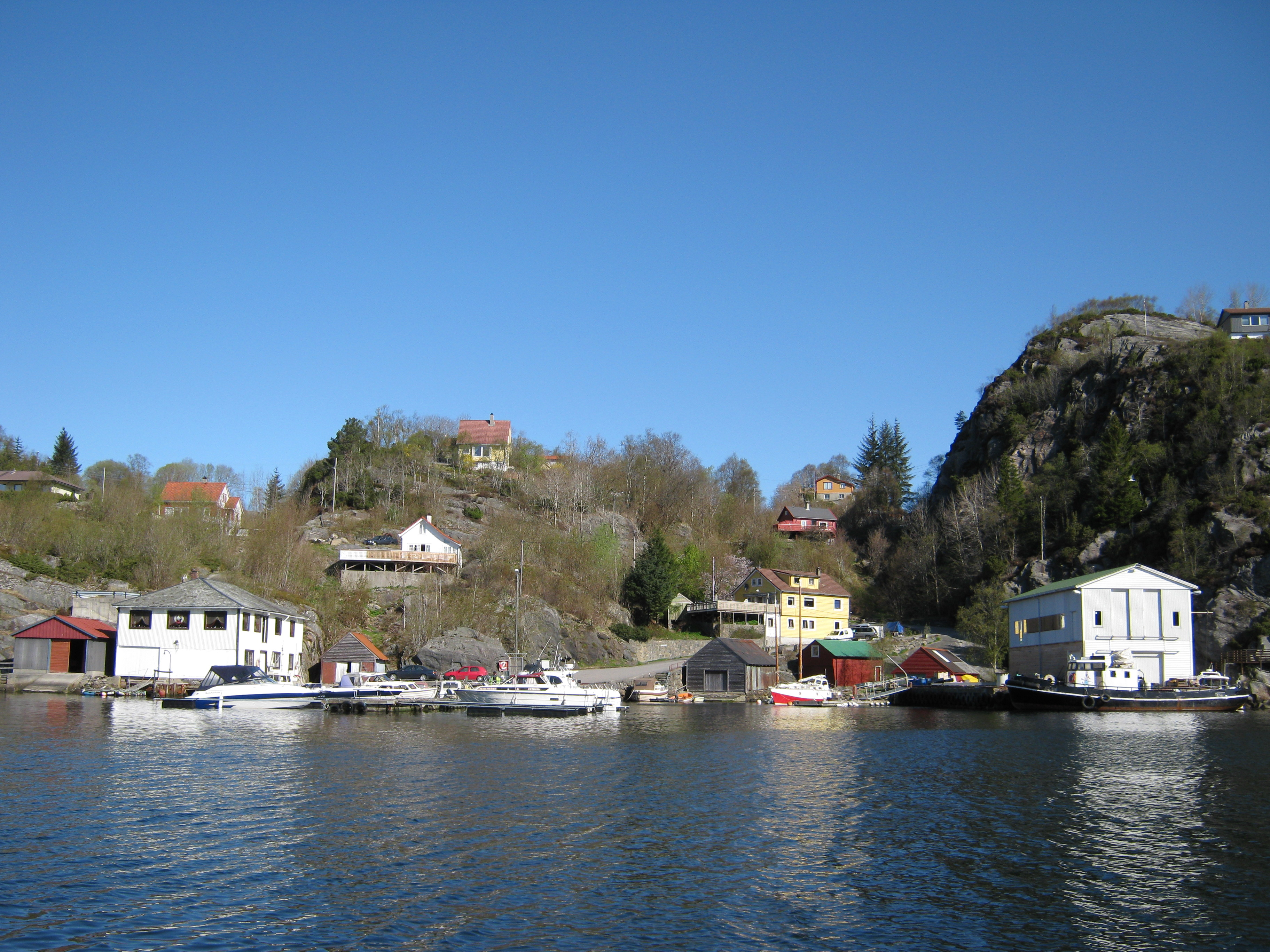 Davanger kai på Askøy, Hordaland